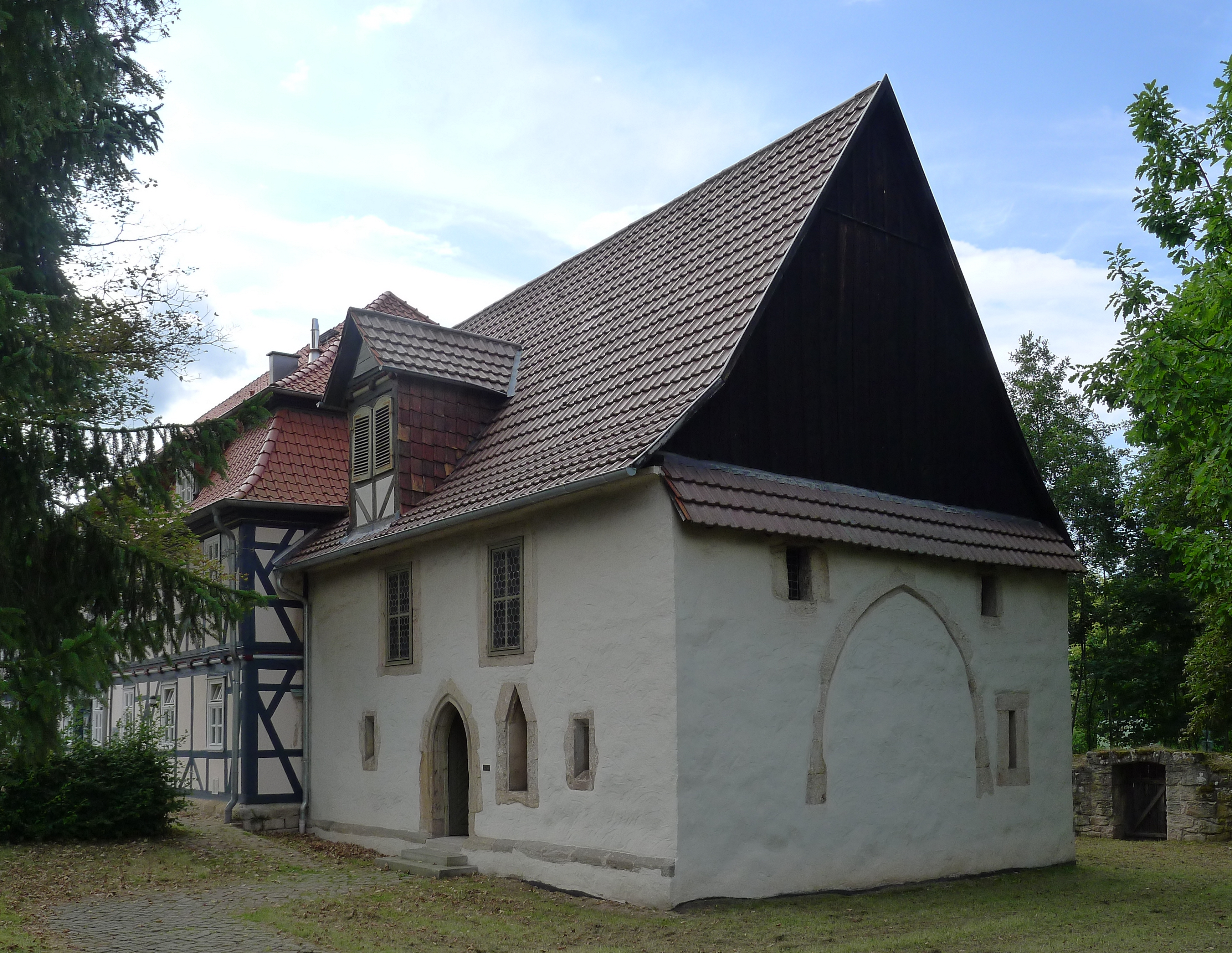 Blick auf die Kapelle, dahinter das Hospital